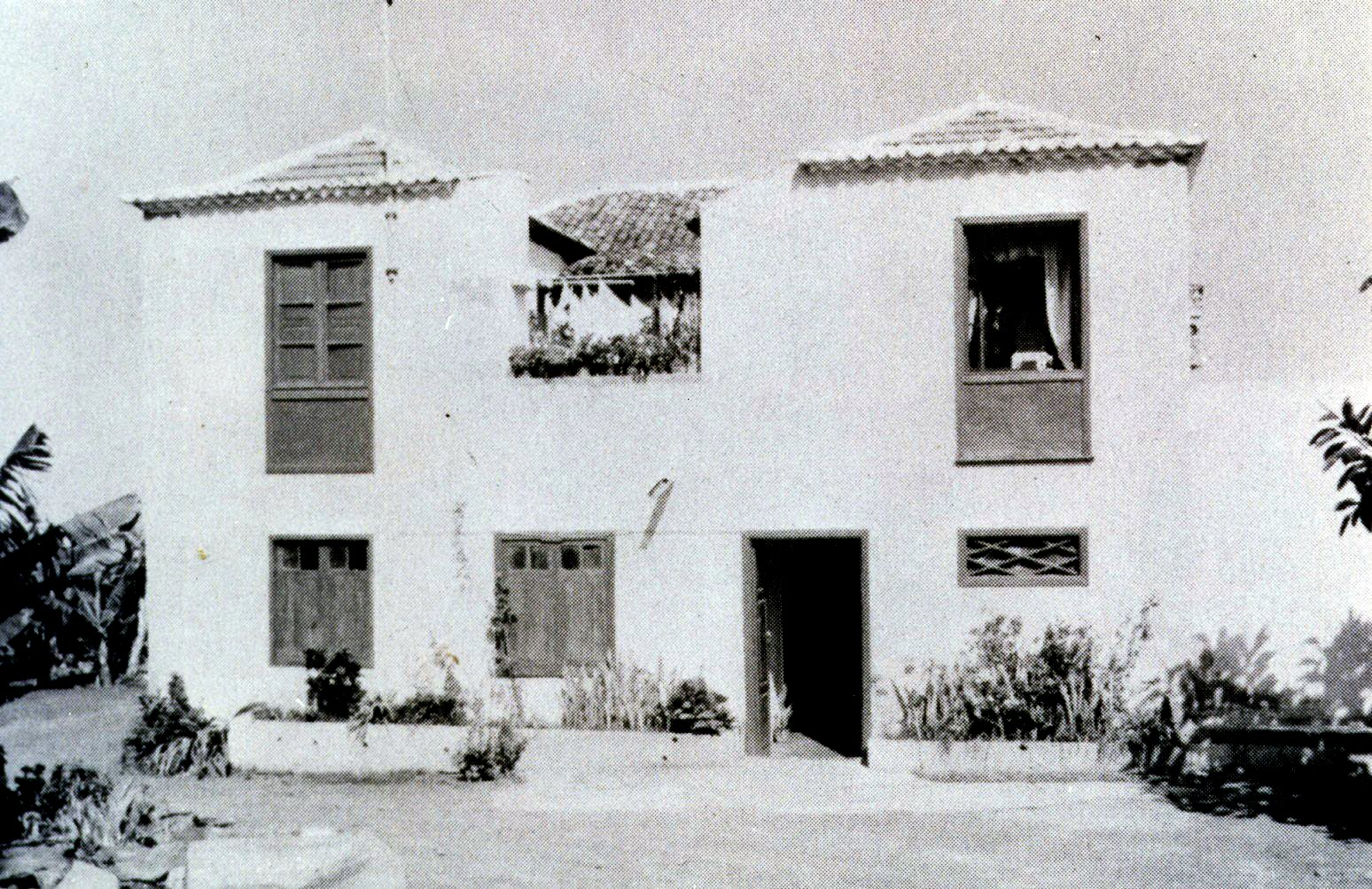 Frente Casa Amarilla, Tenerife 1975.